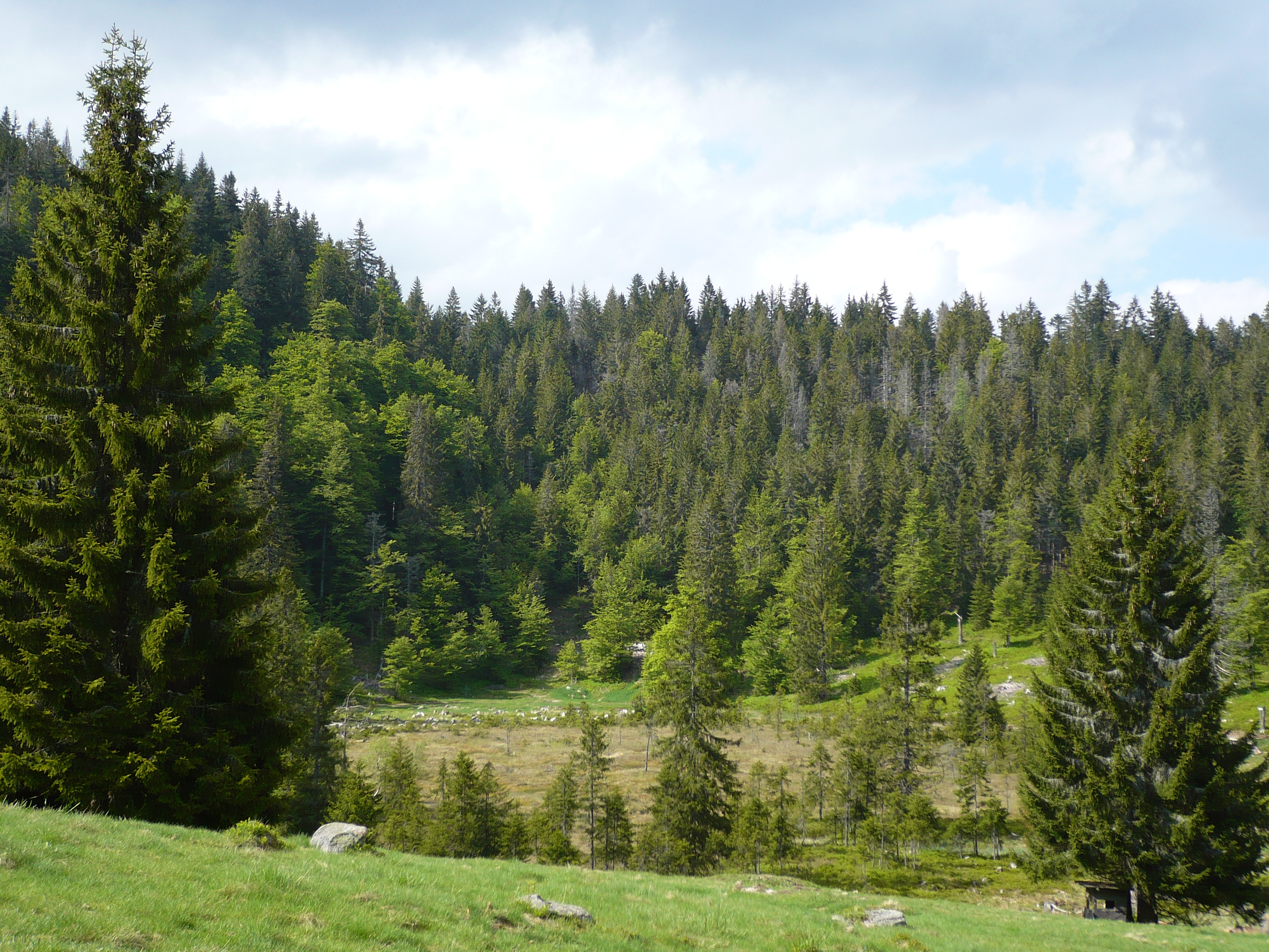 Scheibenlechtenmoos Blick Richtung Spießhorn